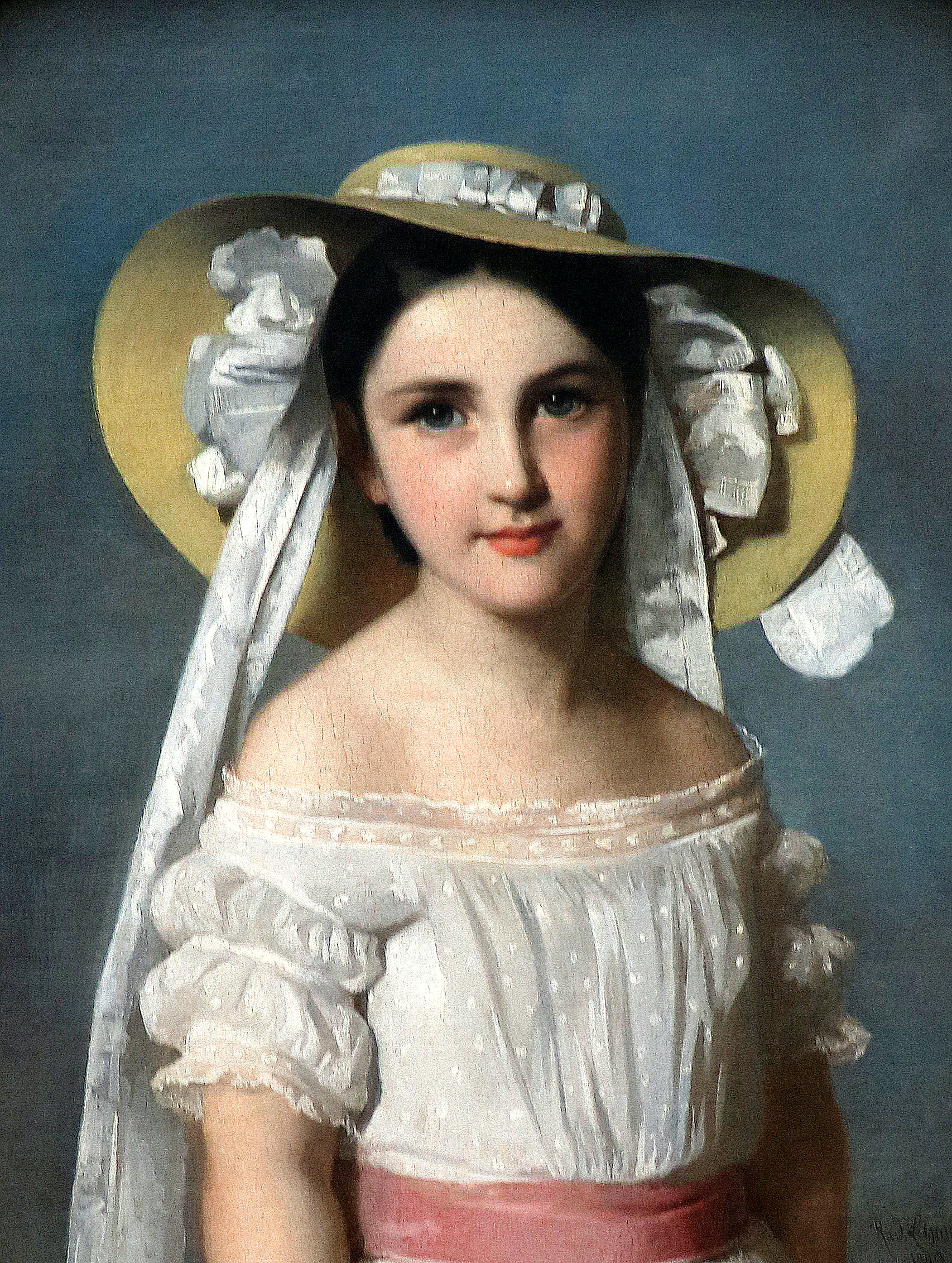 Portrait de Miss Emily Leo par Wilhelm August Rudolf Lehmann (1849). Ce portrait représente la cousine de l’artiste enfant. Huile sur toile / Don M.Chaney. 1966 / Inv. 6778 . 966.6.1.P Musée d'arts de Nantes, France